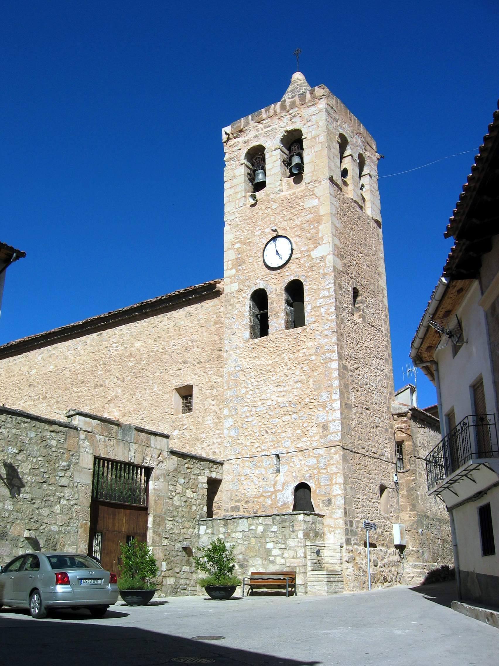 Vista parcial de la parroquial de El Cuervo (Teruel), con detalle del campanario, desde la plaza Mayor.